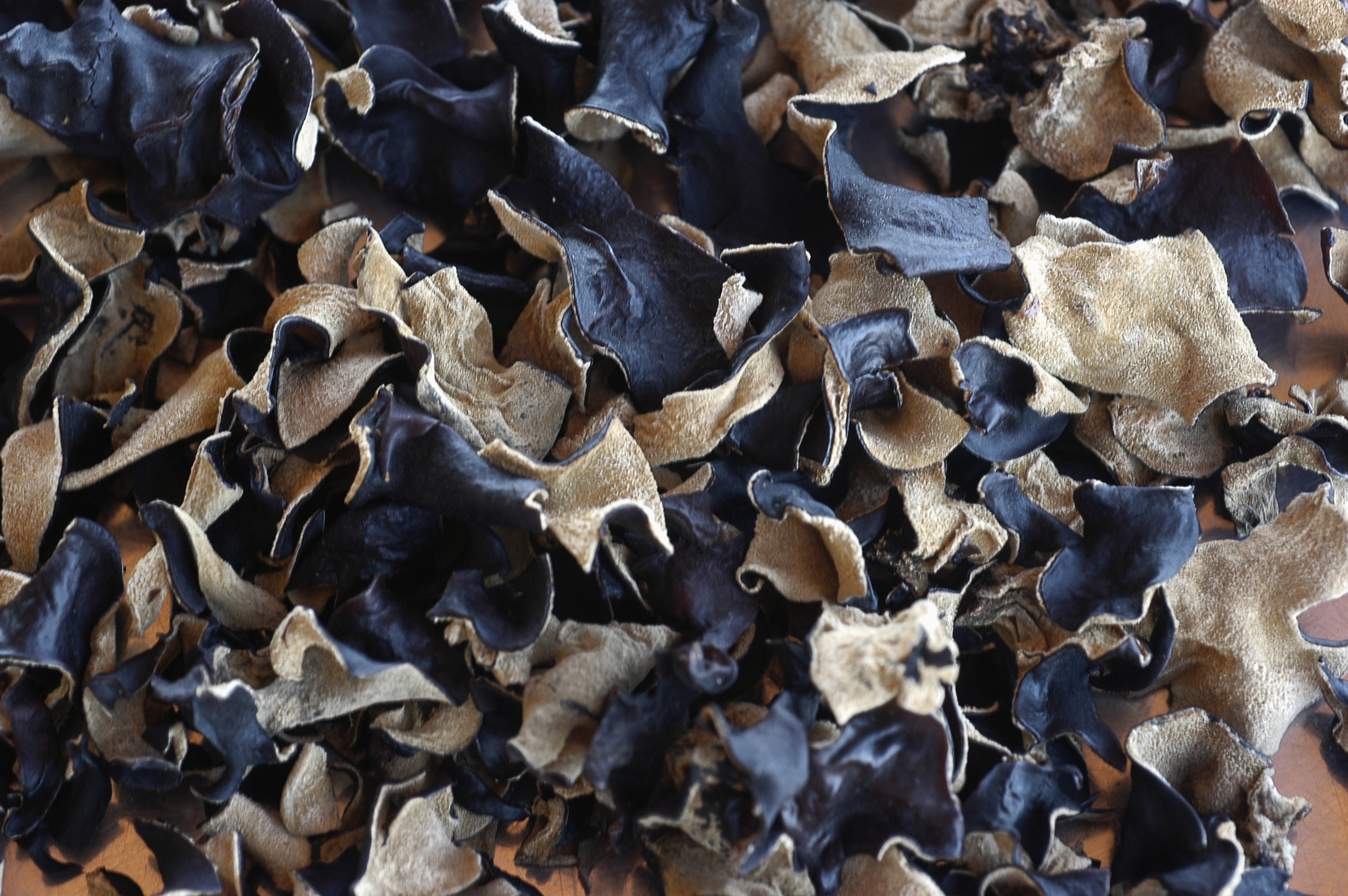 Champignons noir, déshydraté (Auricularia judae)